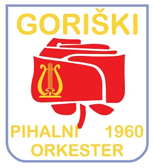 Grb Goriškega pihalnega orkestra